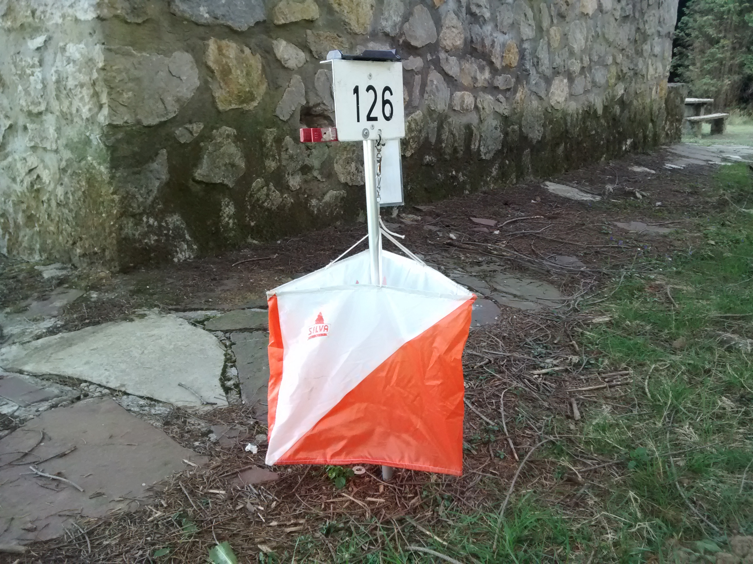 2015-04-26an Andatzan jokatu zen mendi bizikleta gaineko orientazio probako kontrol-puntu bat